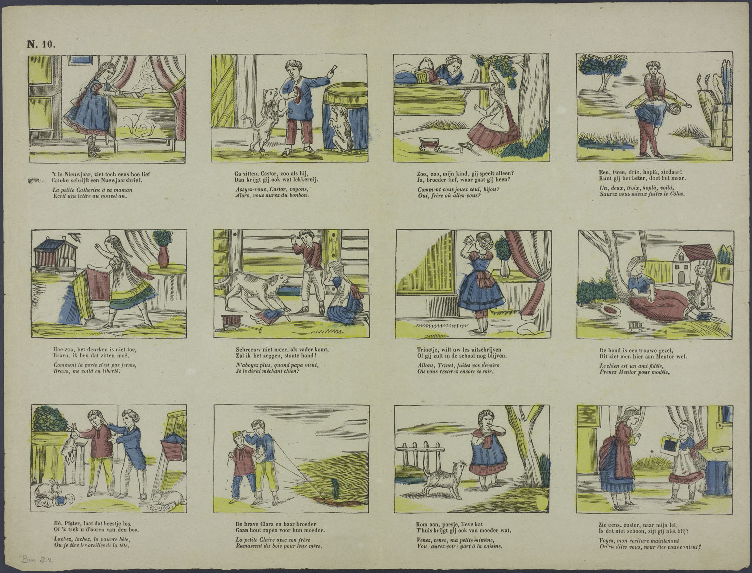 Oblong centsprent met 3 x 4 omkaderde houtsneden met bezigheden uit het leven van kinderen: een nieuwjaarsbrief schrijven, de hond wat lekkers geven, buiten spelen, haasje over, een vogeltje uit de kooi laten, verdriet over een kapotte pop, les op school, bij de hond zitten, een konijn bij de oren optillen, hout halen, de poes lokken, een lei tonen. Bevat tweeregelige rijmende onderschriften in Nederlands en Frans.